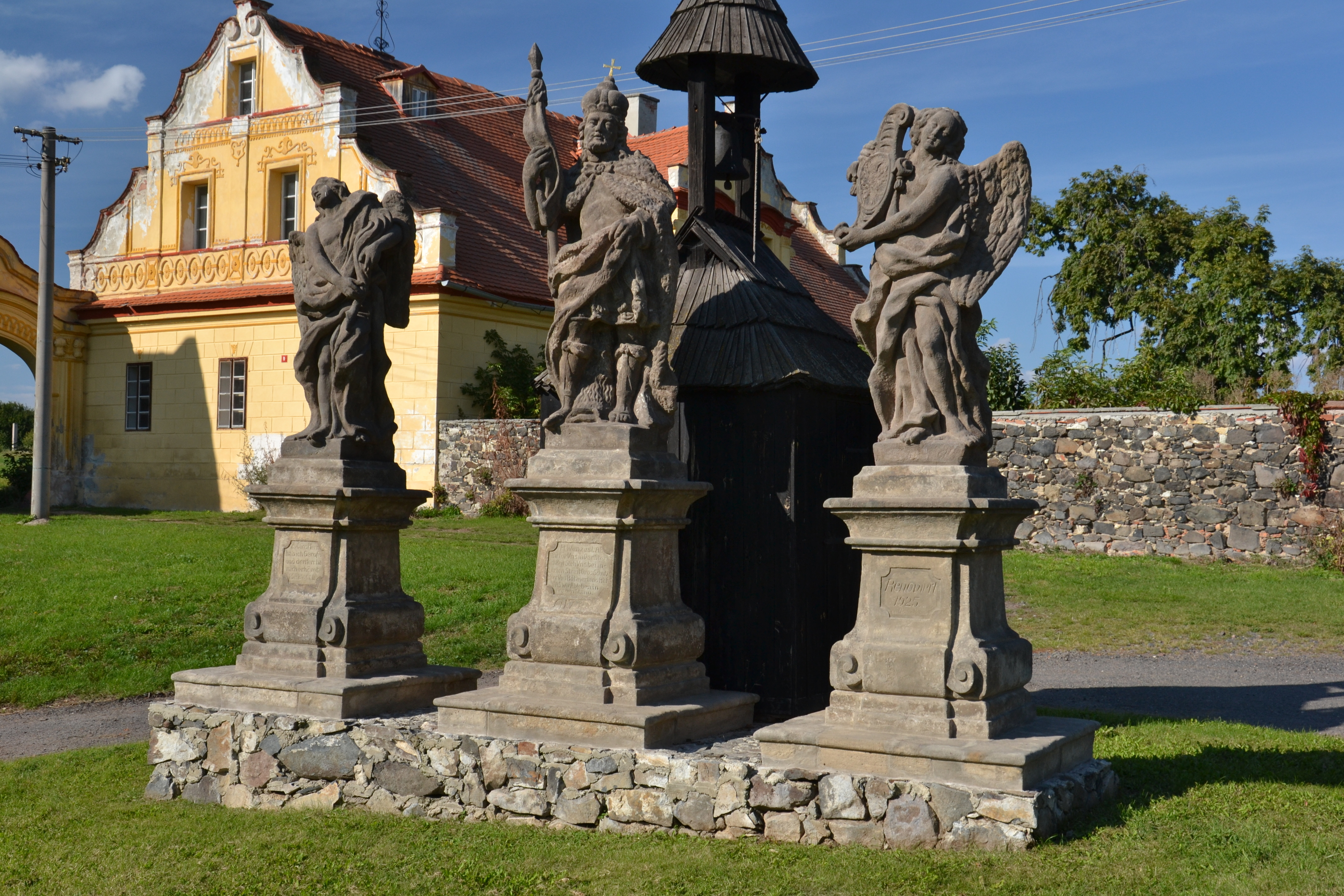 Socha sv. Václava (Nové Třebčice), Nové Třebčice